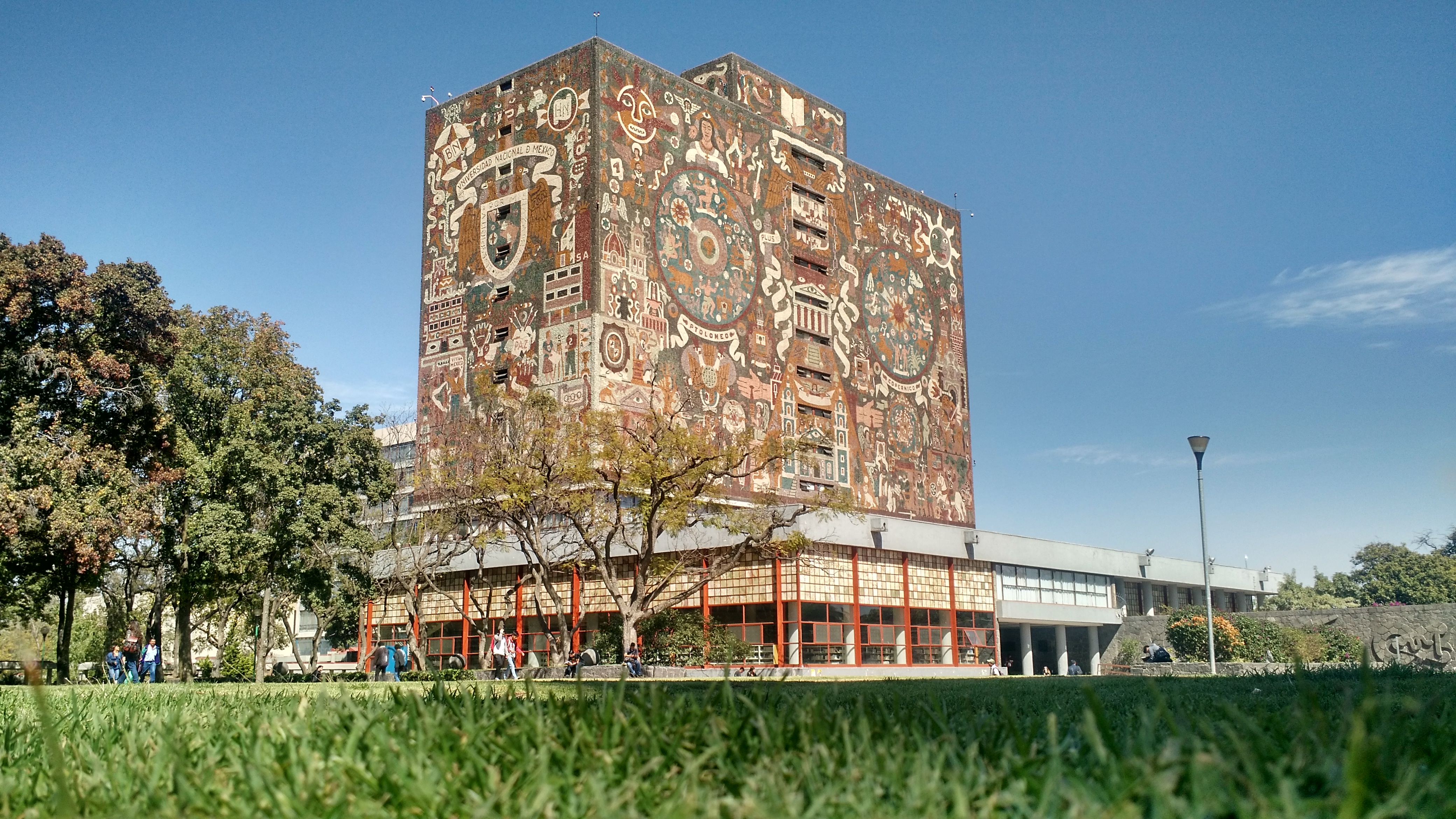 Biblioteca central de la UNAM.